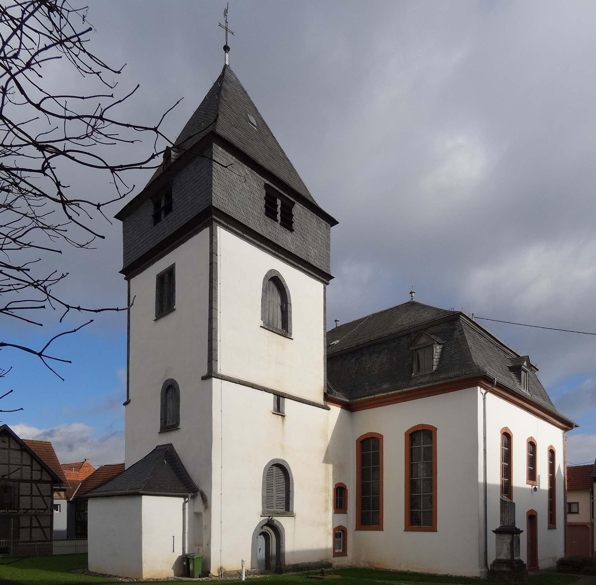 Evangelische Kirche Langsdorf (Lich)